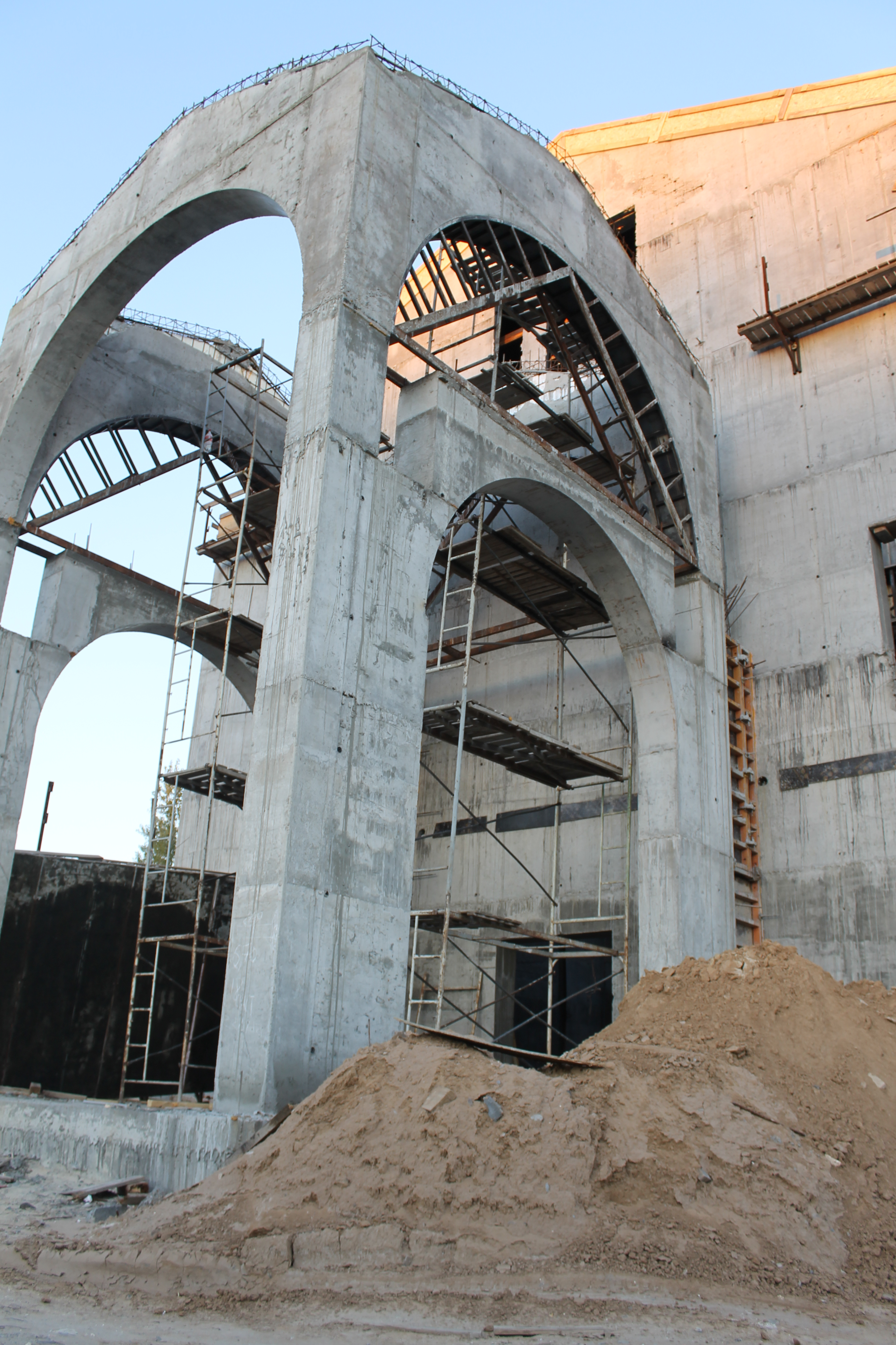 Строительство храма, октябрь 2014 г.